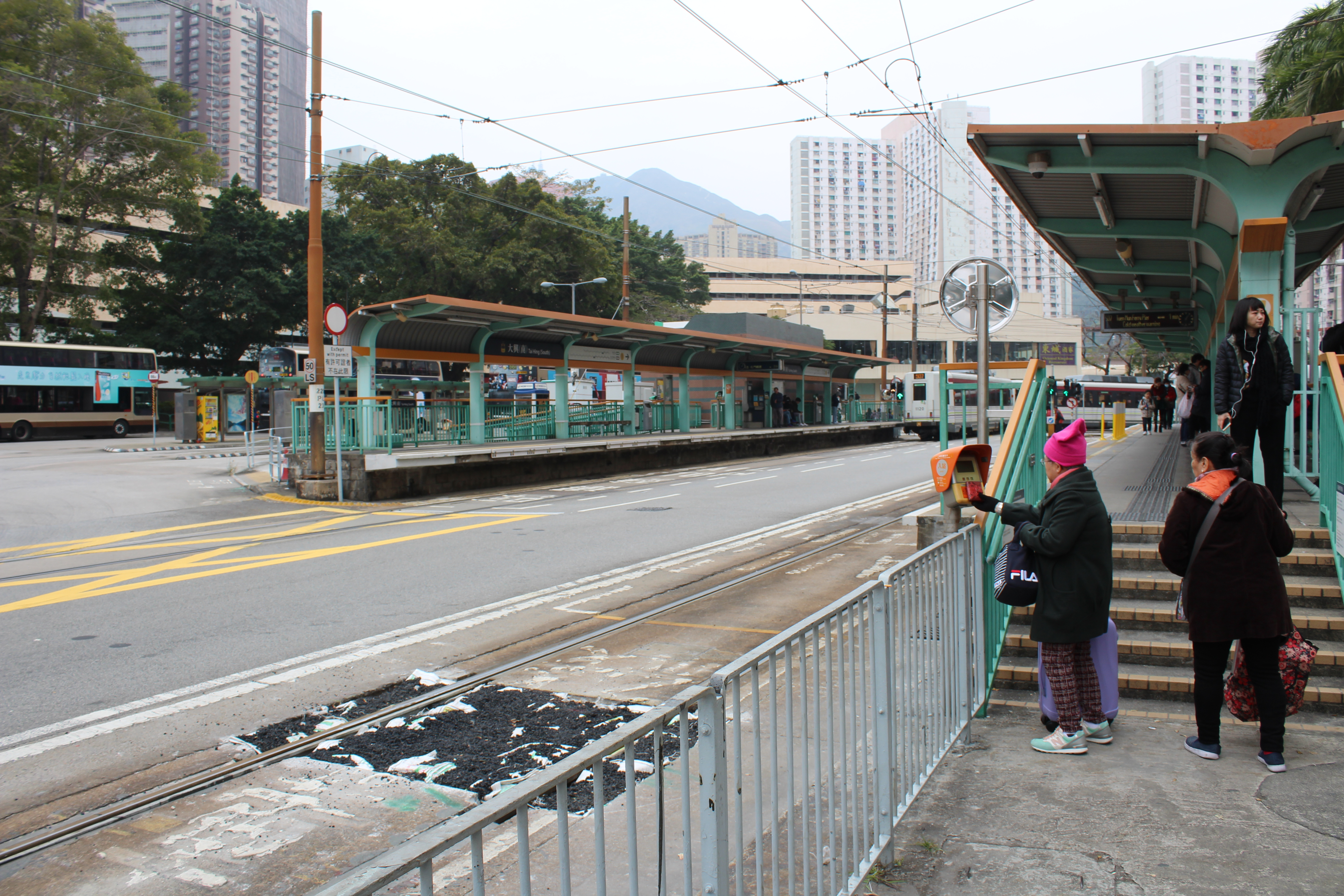 大興（南）站月台